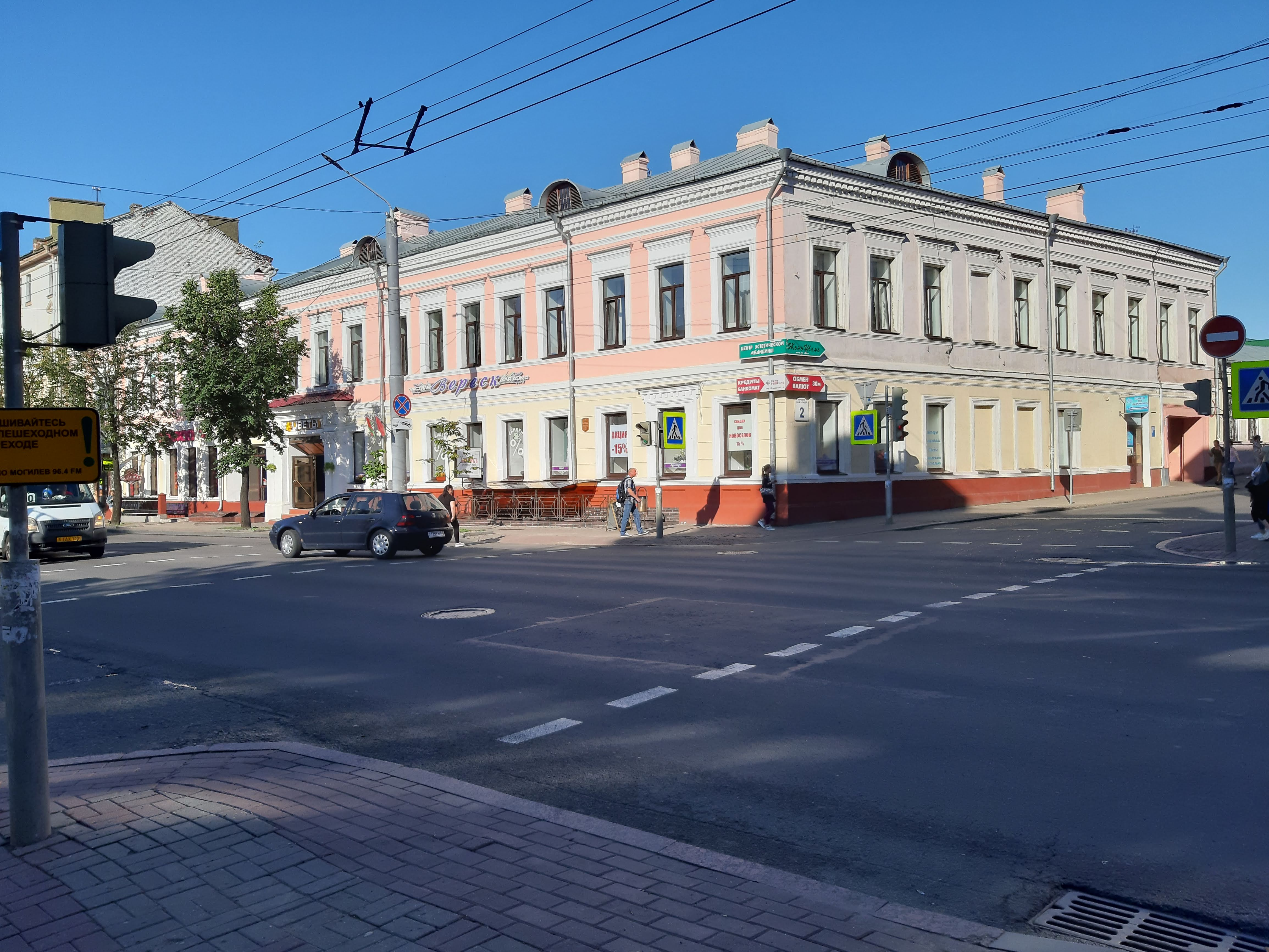 Магілёў. Засілле рэкламы на Першамайскай